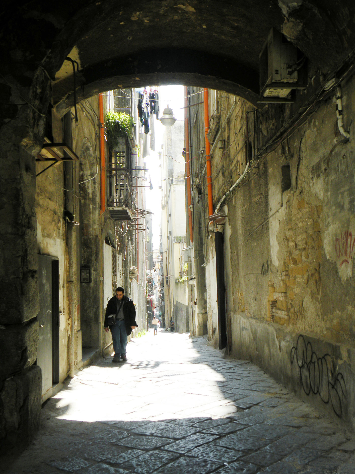 Улица в историческом центре города